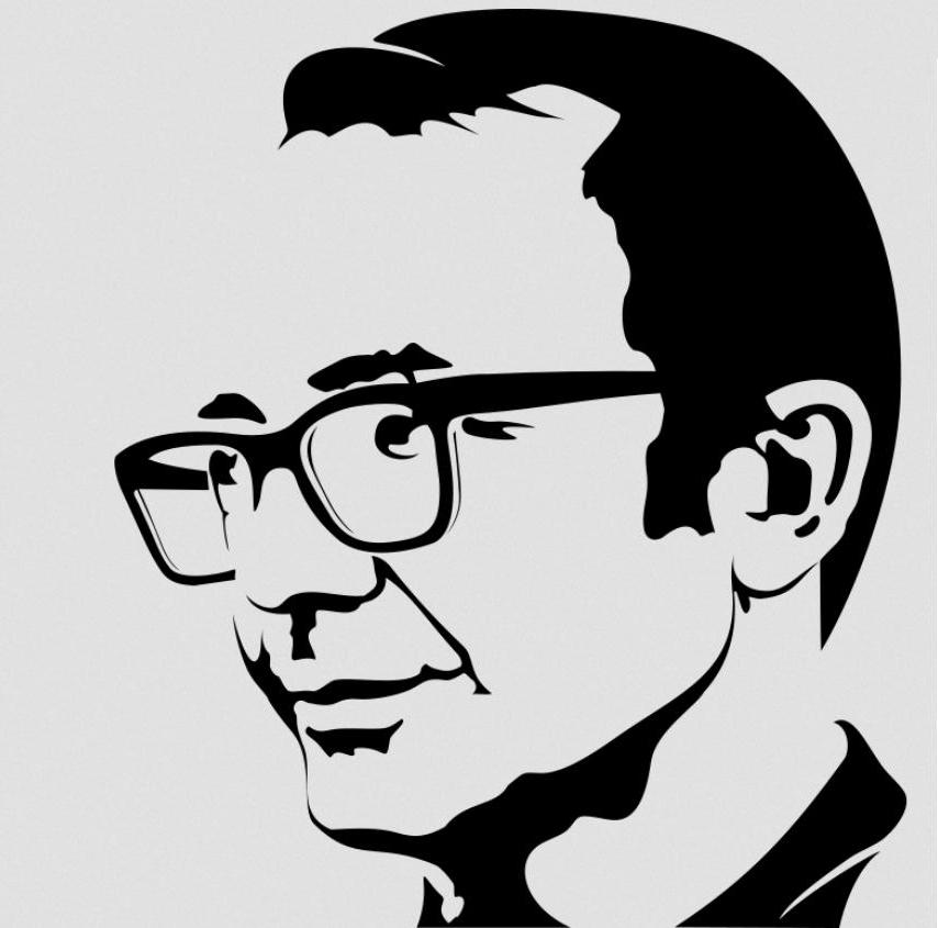 Rodolfo Walsh. Silueta de su perfil en blanco y negro usada en la creación de un monumento a los periodistas desaparecidos durante la dictadura cívico-militar argentina (1976-1983). El monumento está situado en avenida Costanera y Av. 41 de la ciudad de Santa Teresita, en el Partido de la Costa (provincia de Buenos Aires), en la República Argentina. Realizado por la Comision por la Memoria del Partido de la Costa.